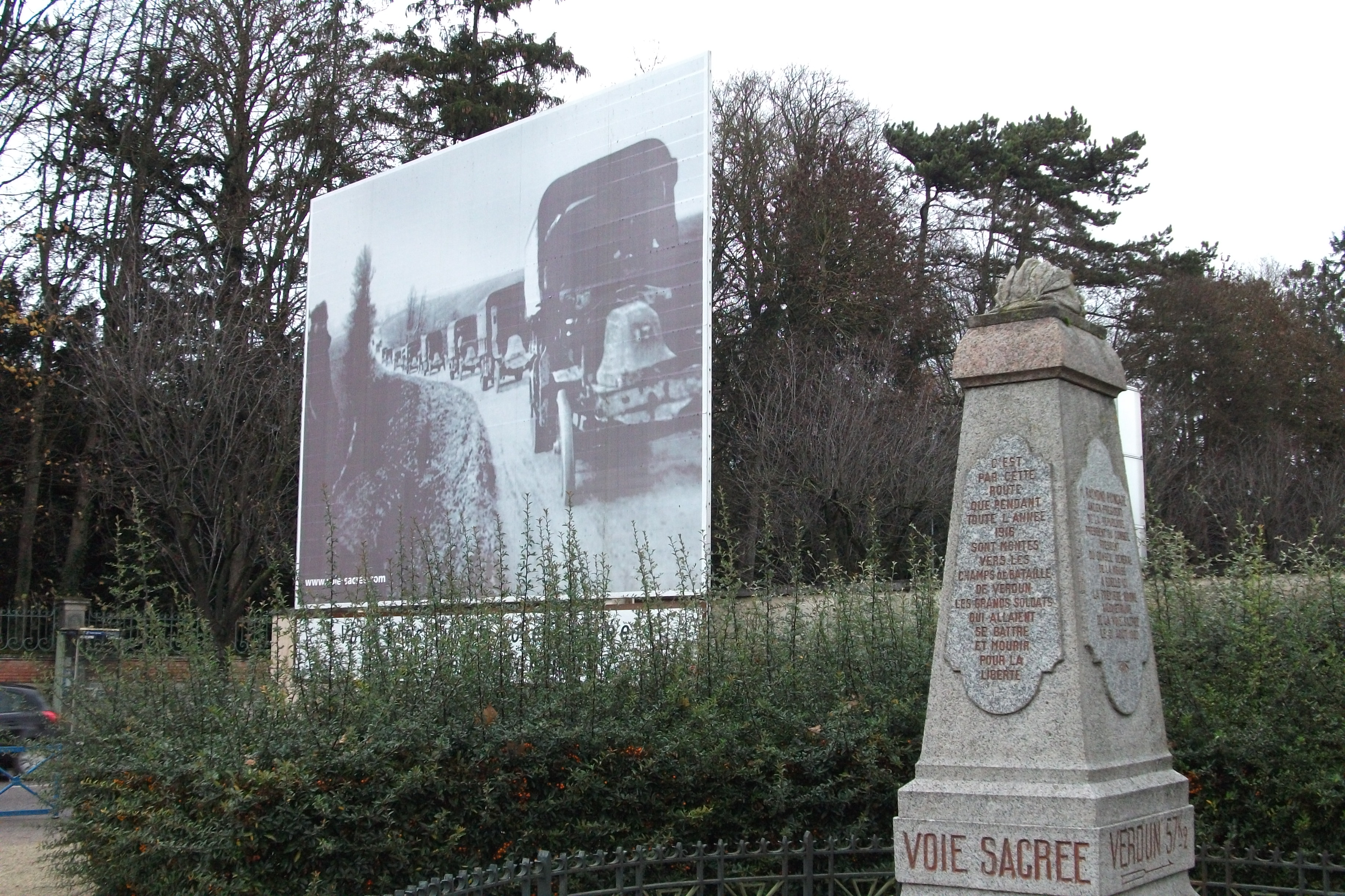 Voie Sacrée, mémorial du kilomètre zéro se trouvant à Bar_le_Duc. Inauguré le 21 août 1922 par Raymond Poincaré.